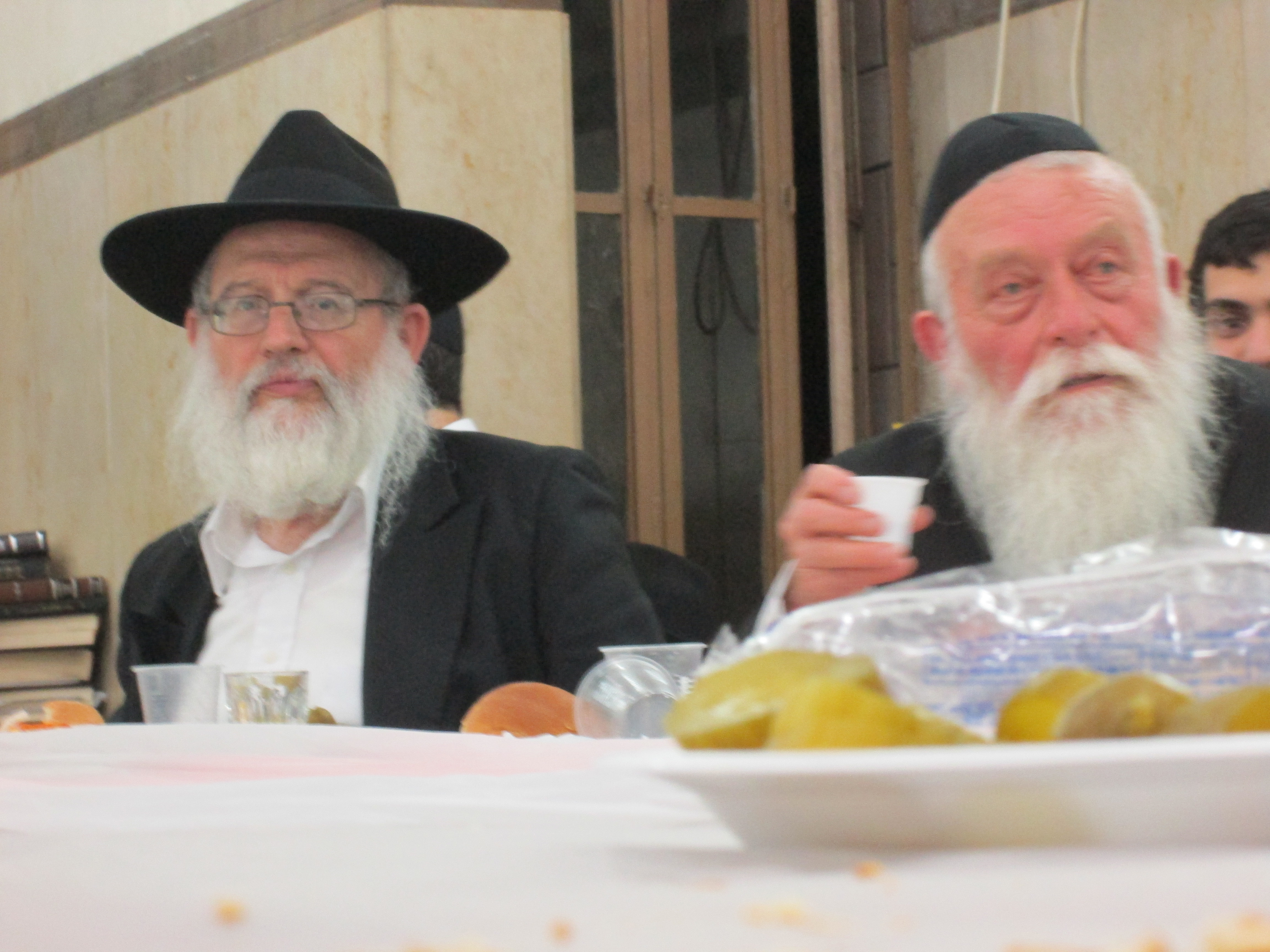 המשפיע זלמן גופין משמאל והמשפיע משה נפרסטק מימין. בעת התוועדות בכפר חב"ד